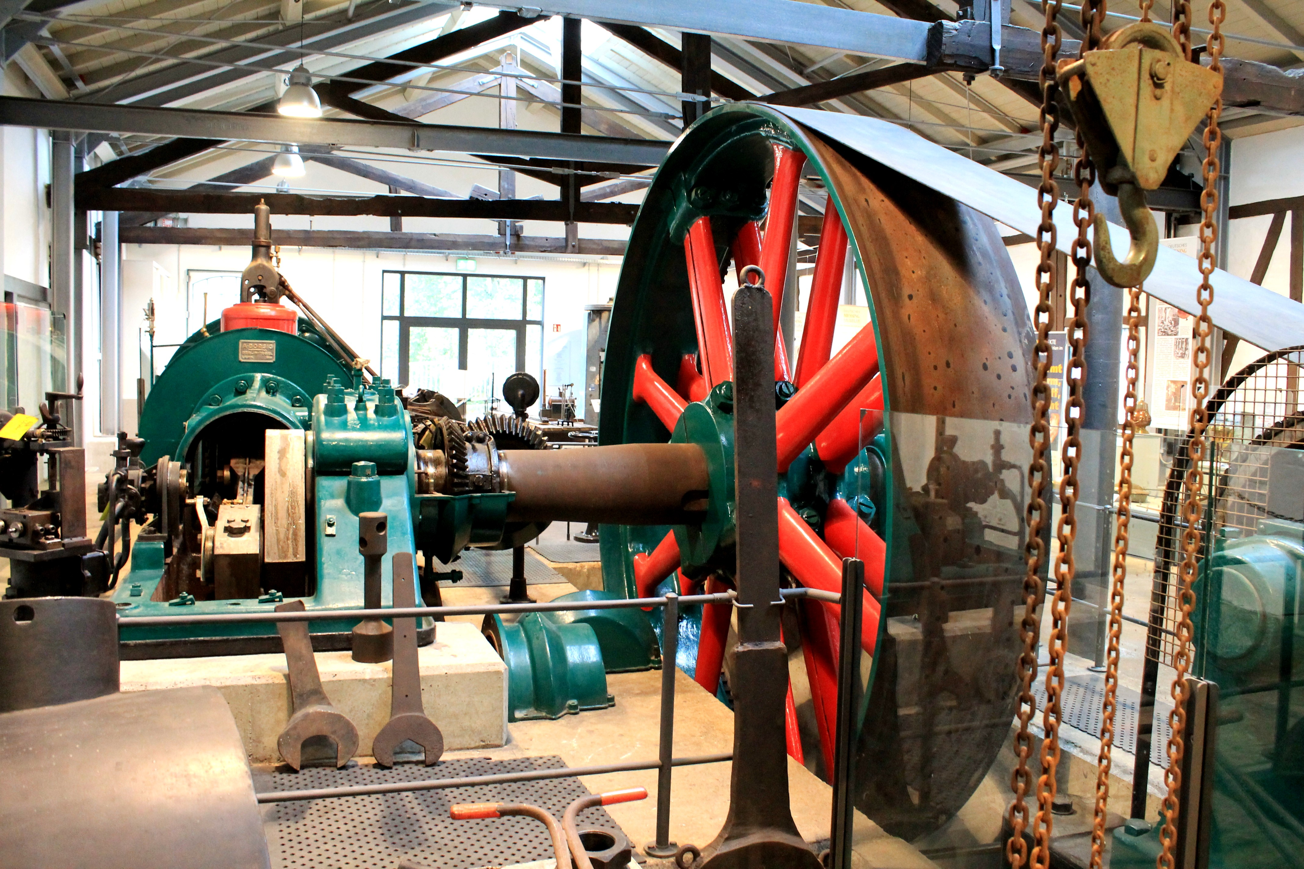 Dampfmaschine